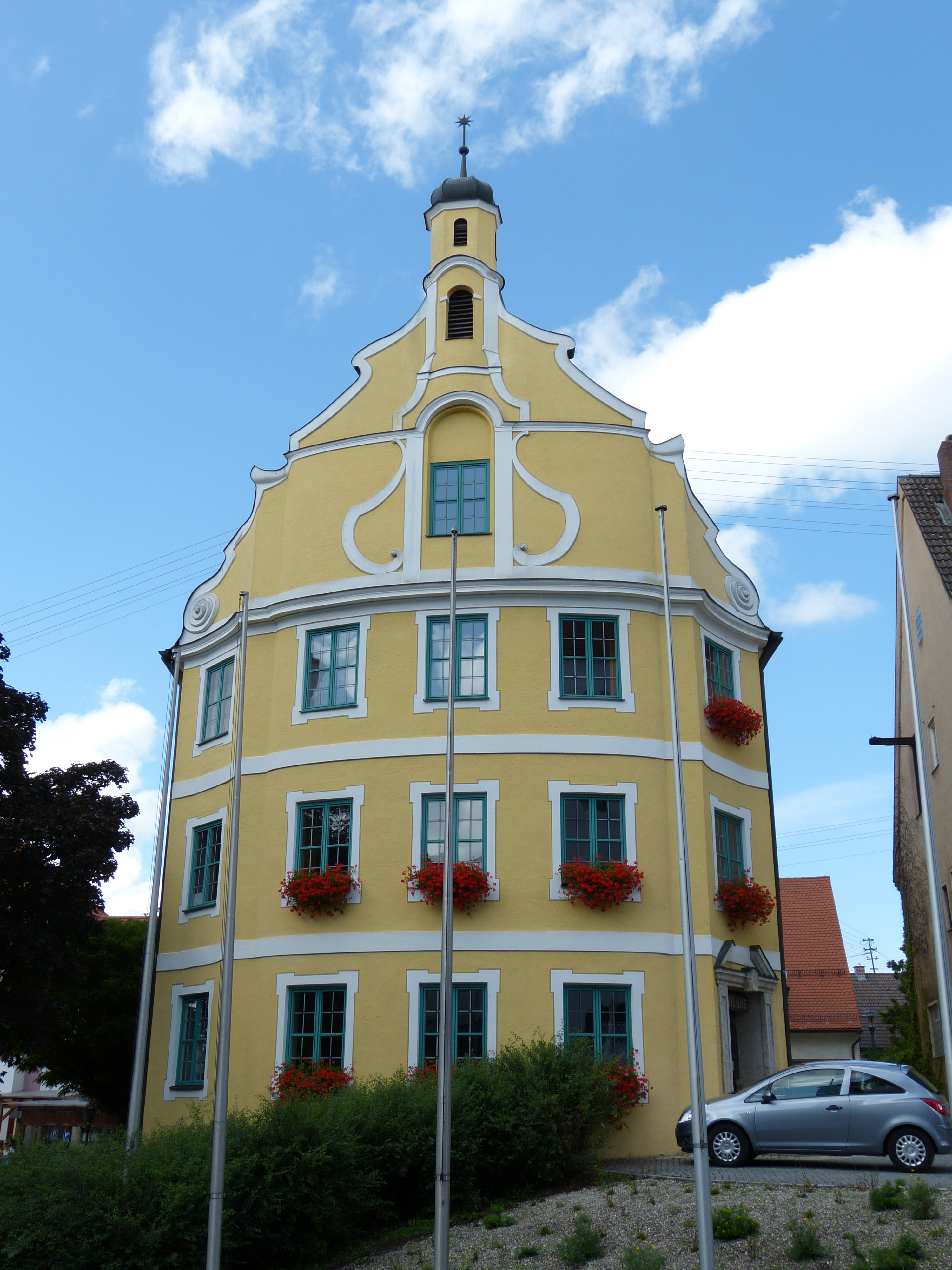 Rathaus, Kirchheim in Schwaben, Landkreis Unterallgäu, Bayern